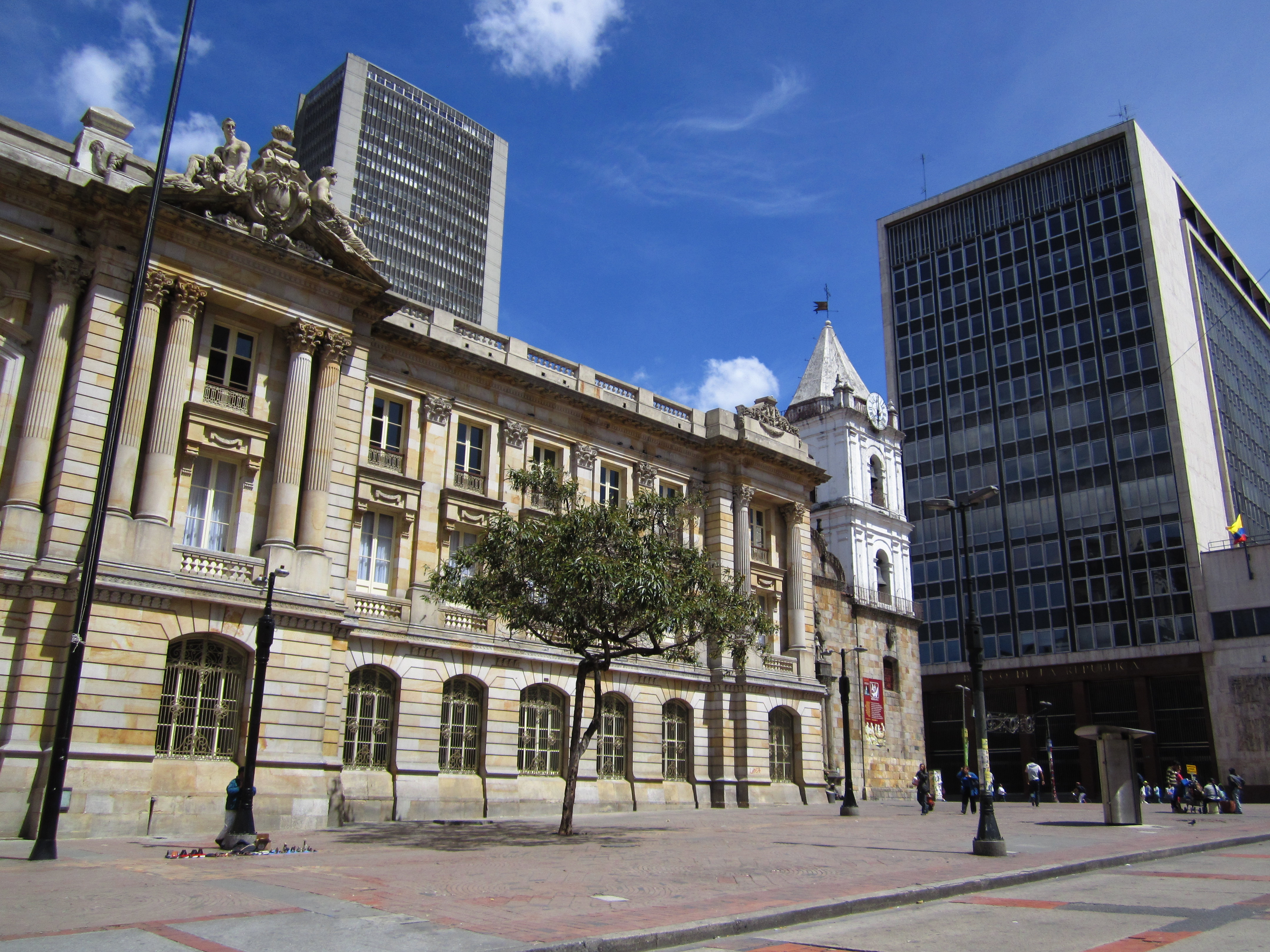 Cruce de la avenida Jiménez con la carrera Séptima. De izquierda a derecha se aprecian el palacio de San Francisco (antigua Gobernación de Cundinamarca), la torre de Avianca, la iglesia de San Francisco y el edificio del Banco de la República.